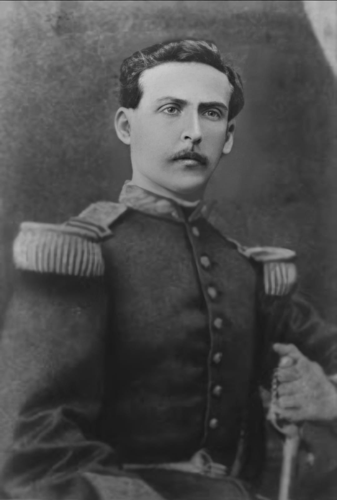 Coronel Arnaldo Panizo